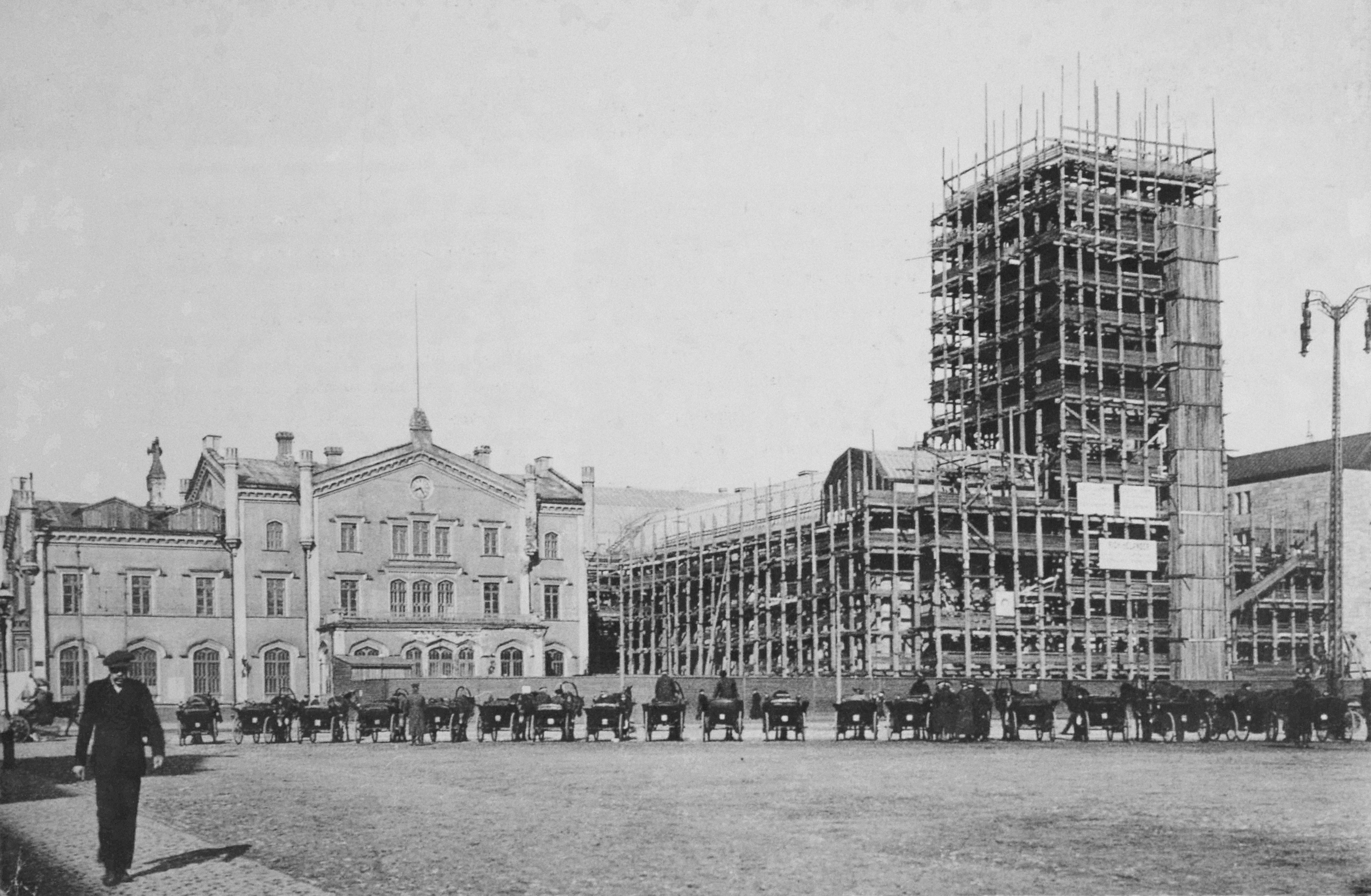 Helsingin vanha rautatieasemarakennus ja uusi asemarakennus rakenteilla. Vanhan asemarakennuksen pohjoispääty purettiin vuonna 1912 ja loput 1918.